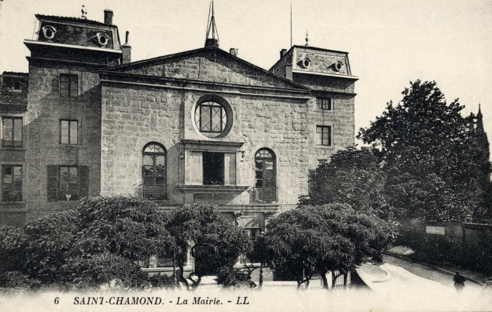 Saint-Chamond (Loire), mairie, début XXe siècle, carte postale ancienne (non grevée de droits).